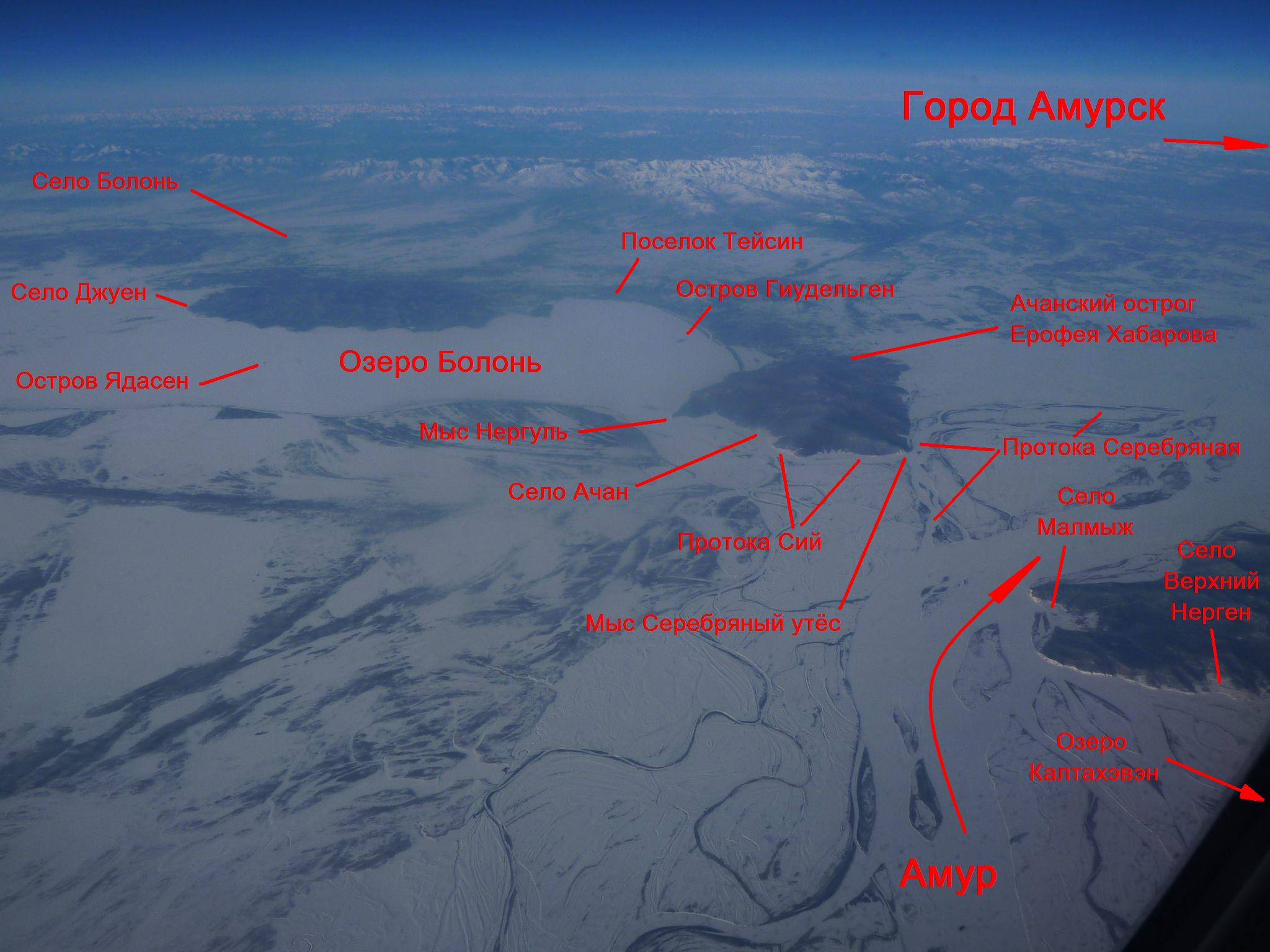 Озеро Болонь, аэрофотоснимок с подписями.